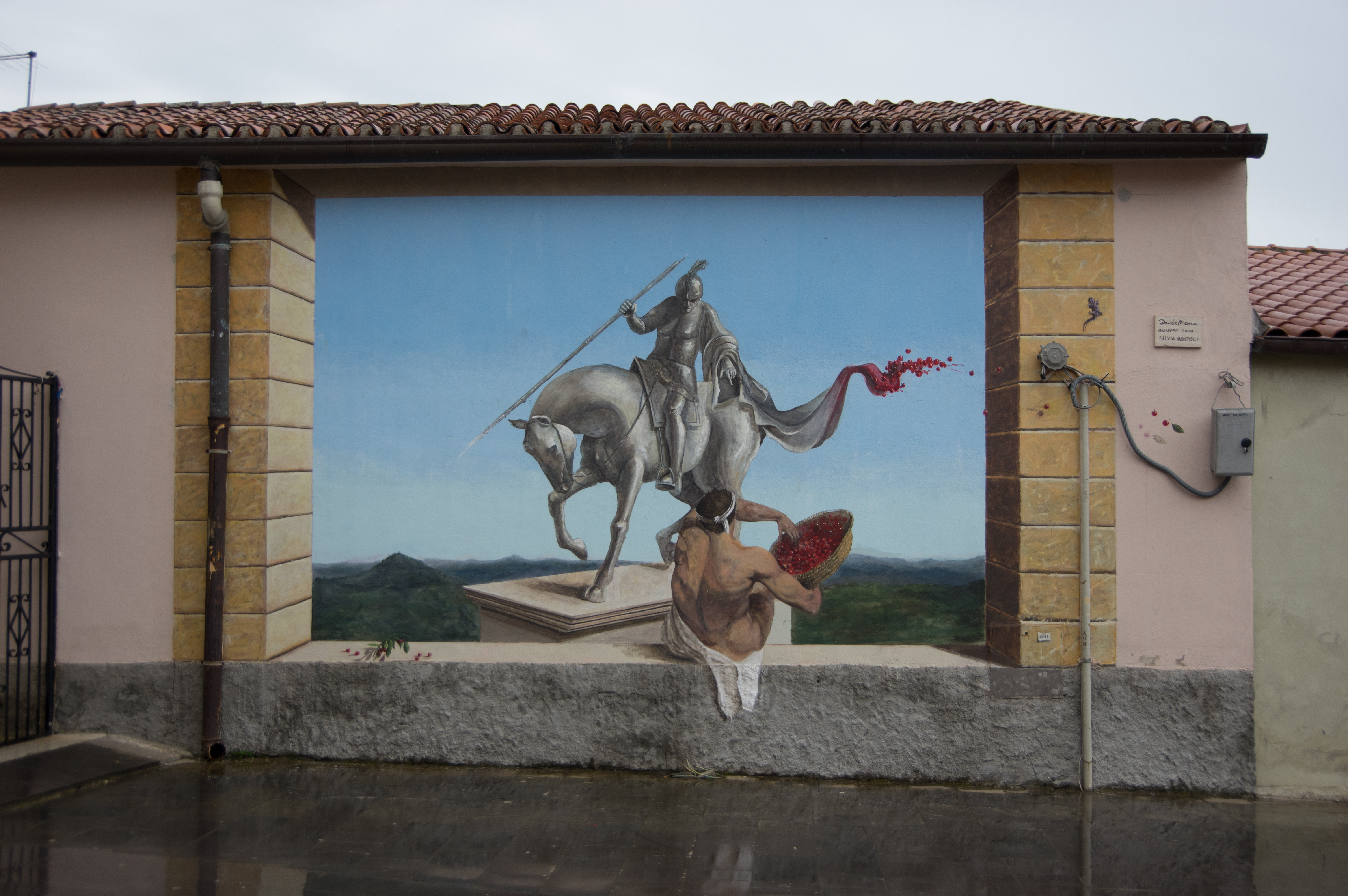 Bonnanaro in Sardinien. Das Wandgemäde befindet sich am Platz mit der Kirche San Giorgio.